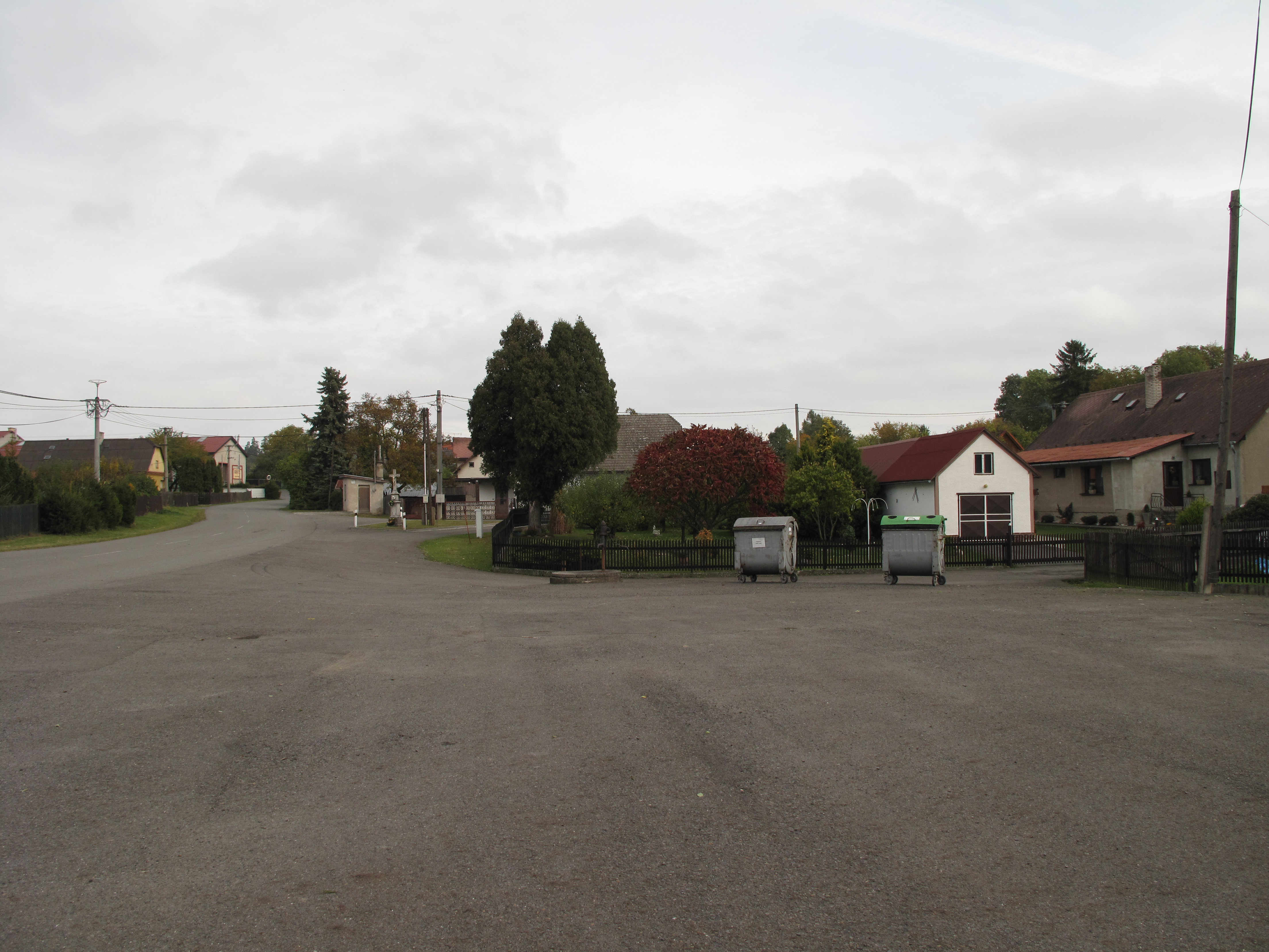 Nové Lublice. Okres Opava, Česká republika.